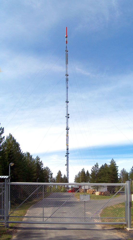 Kiimingin radiomasto